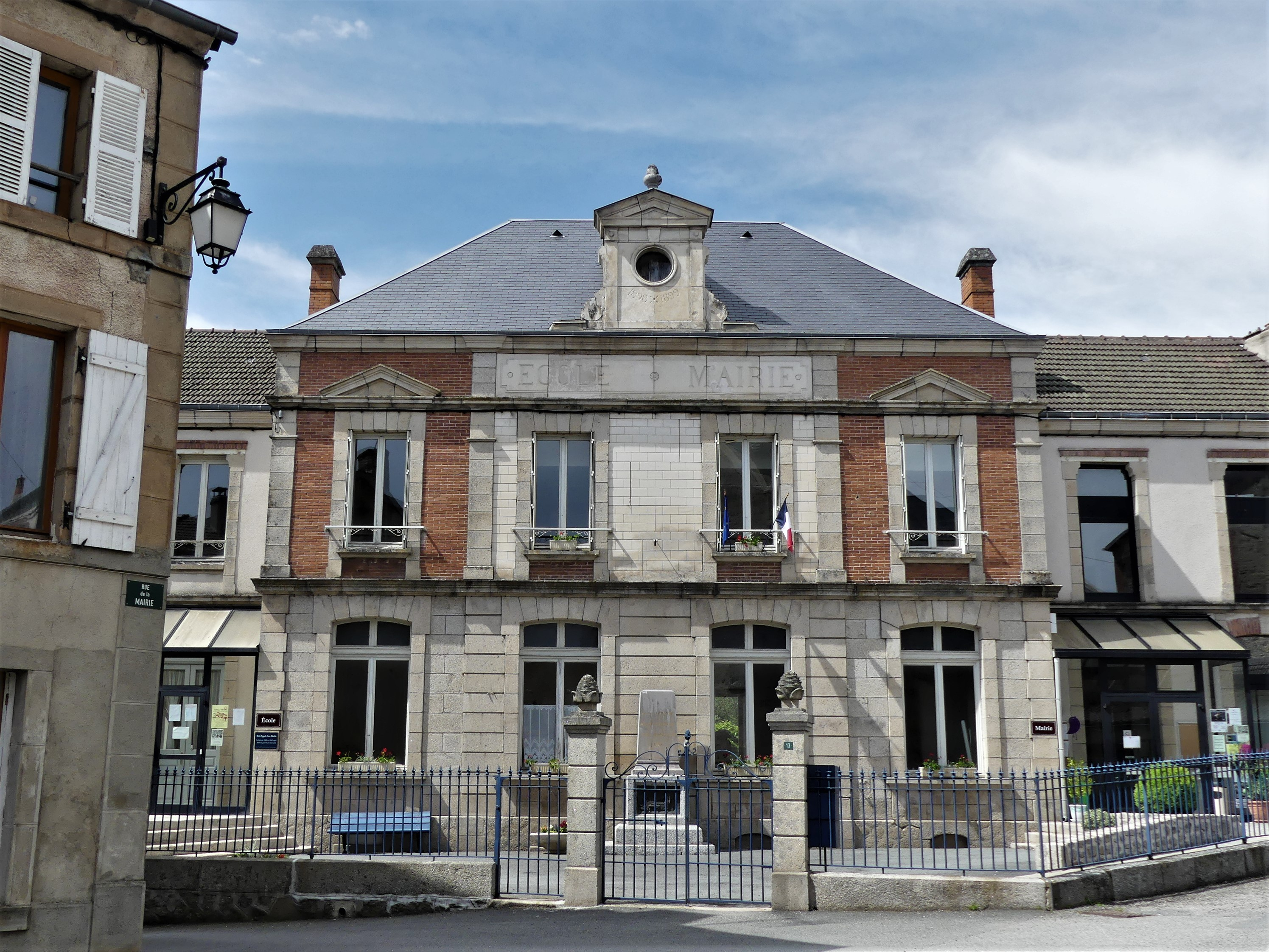 La mairie de Vallière, Creuse, France.